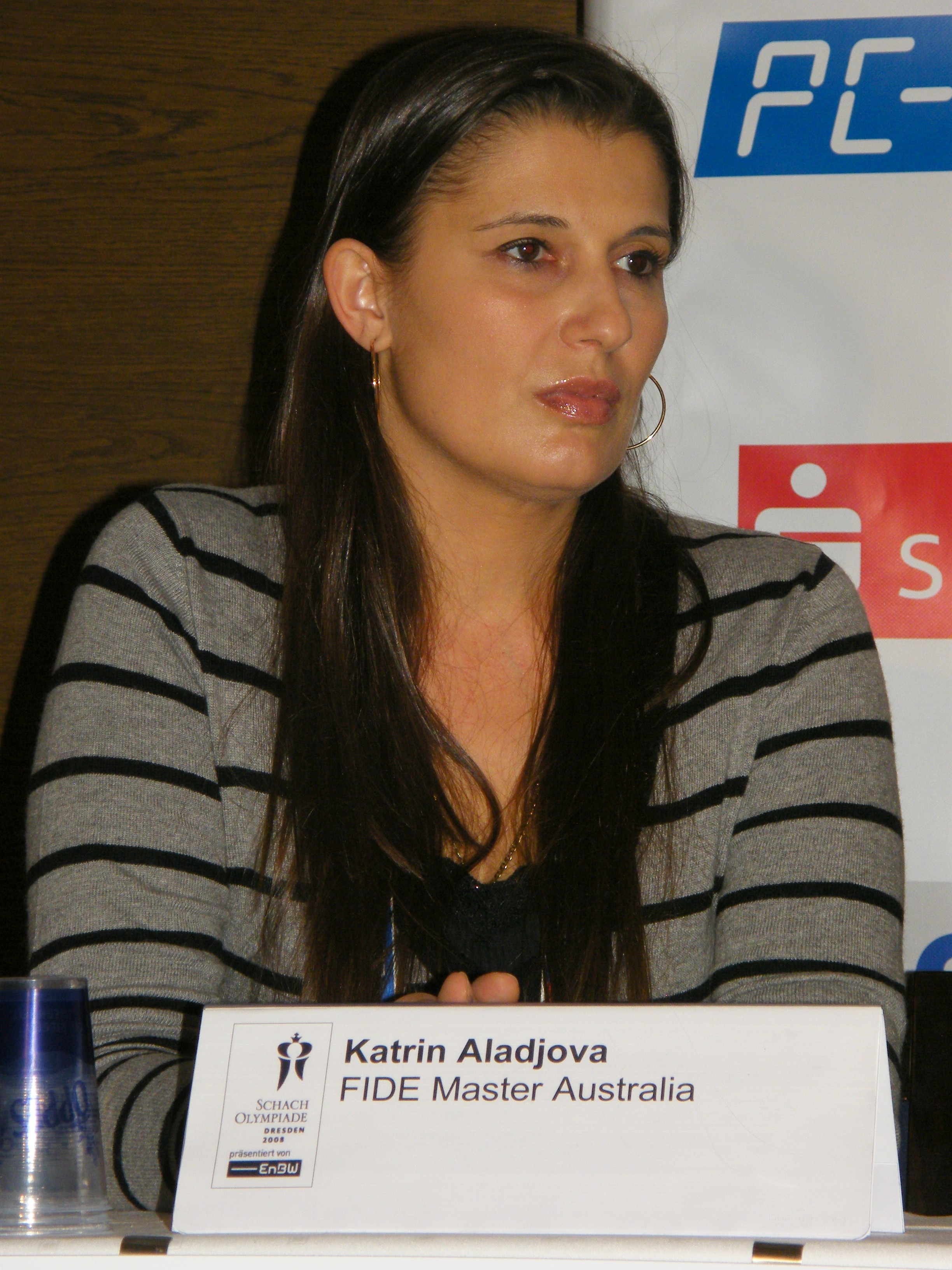 Katrin Aladjowa bei einer Pressekonferenz der 38. Schacholympiade in Dresden 2008